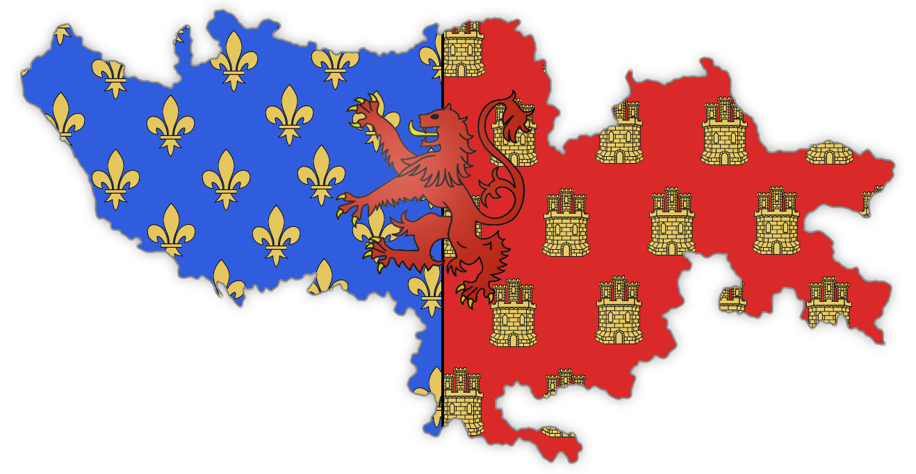 Armoiries Poitou dans territoire Poitou